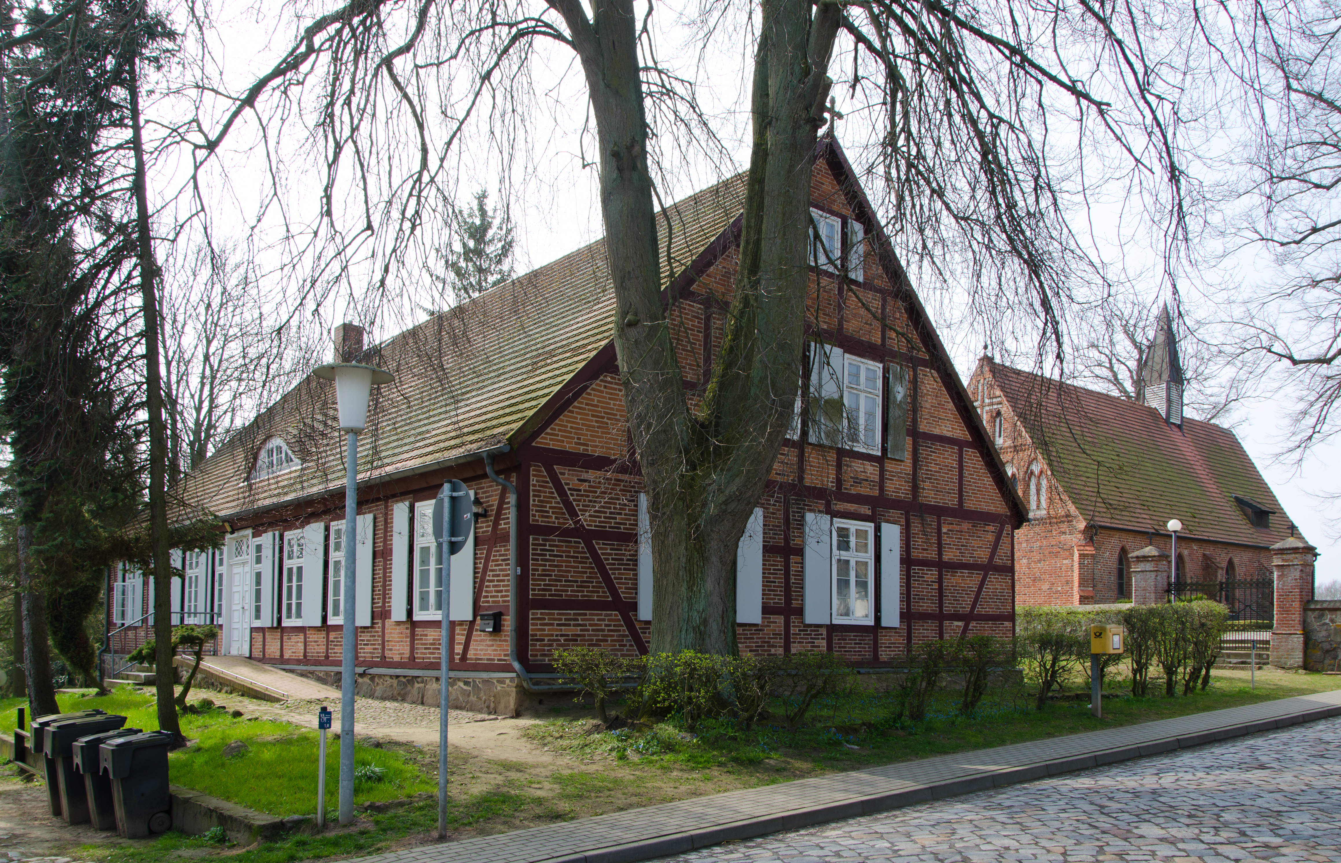 Katzow Pastorat